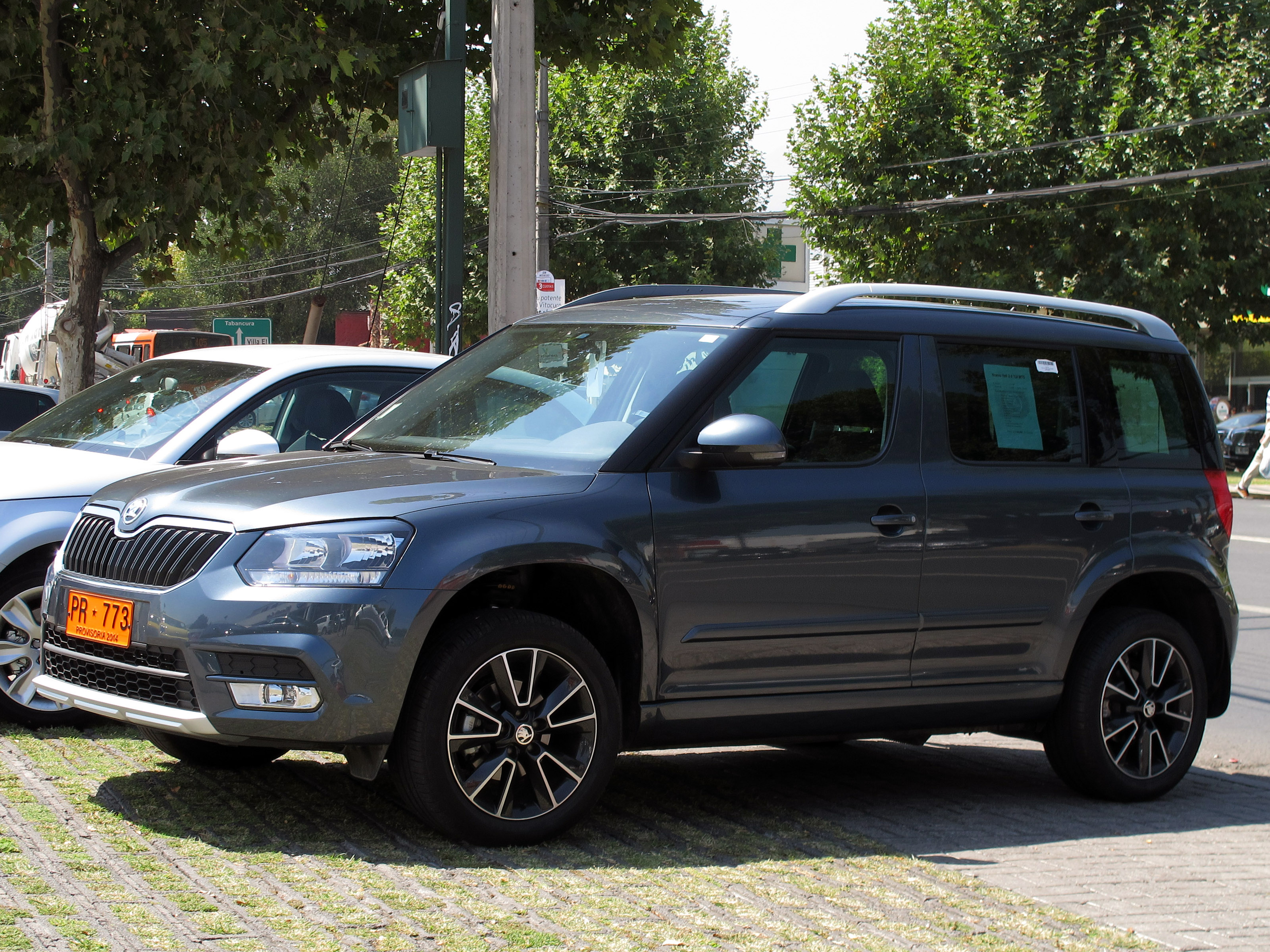 Skoda Yeti 2.0 TDi Elegance 4x4 2015